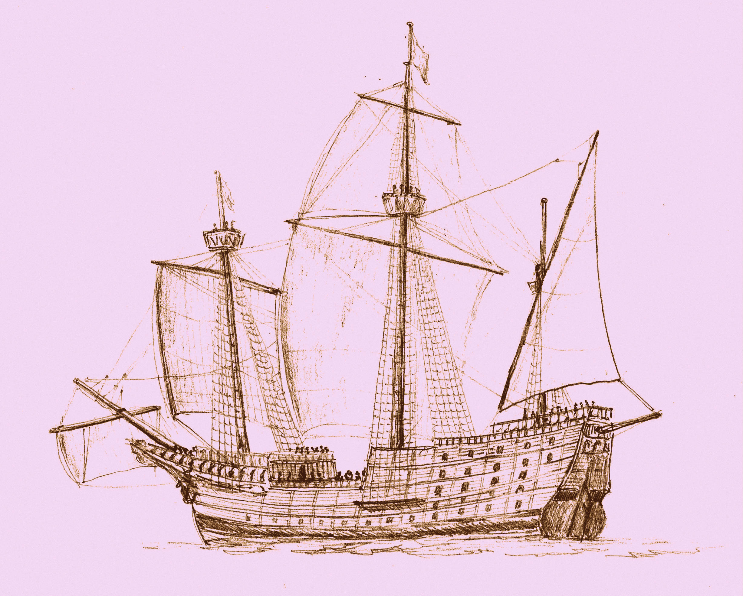 Det store danske orlogsfartøyet "Engelen" som ble bygd i 1510